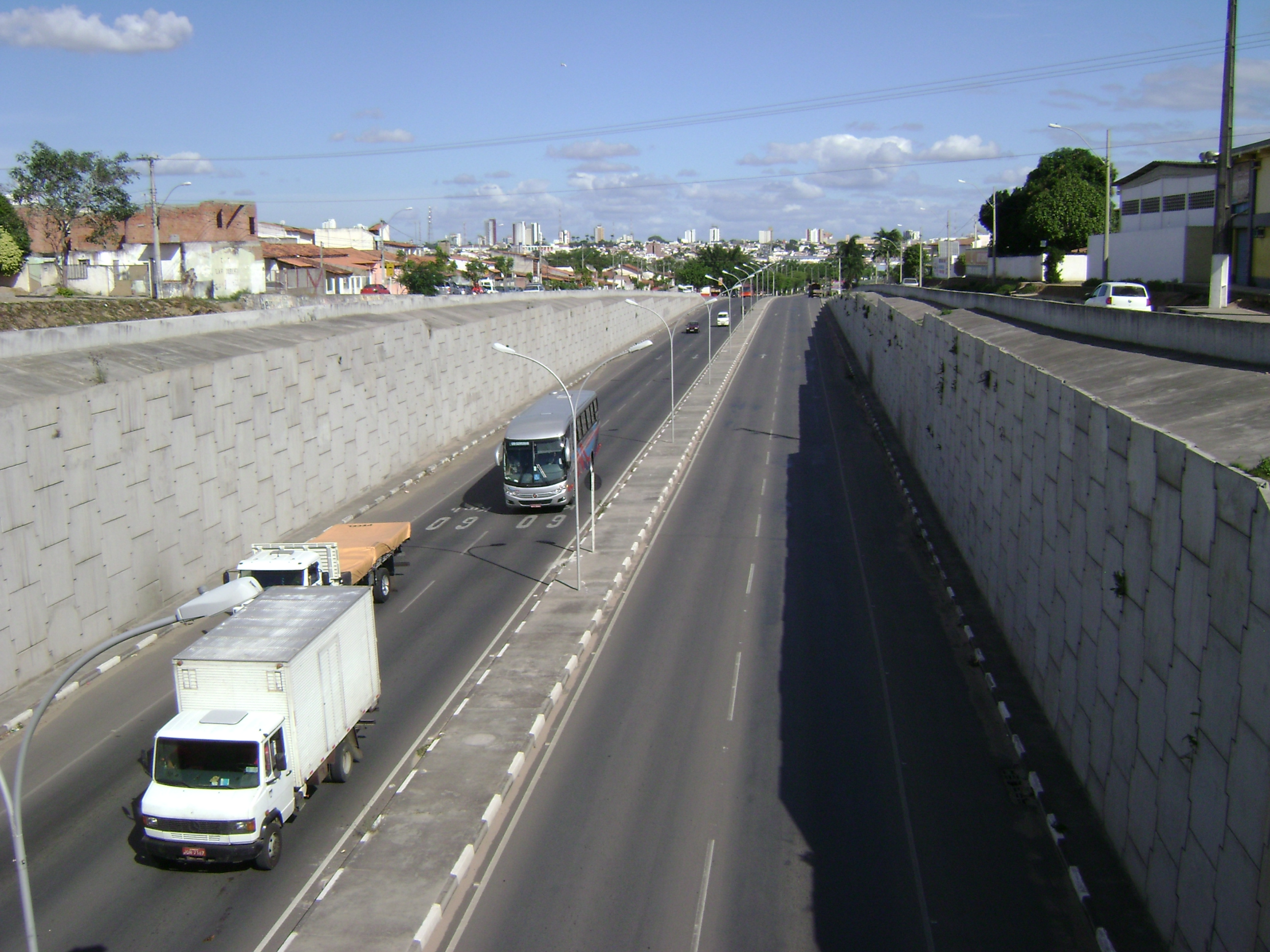 Avenida José Falcão da Silva na entrada do Complexo Viário Prefeito José Ronaldo de Carvalho, em Feira de Santana, Bahia, Brasil.